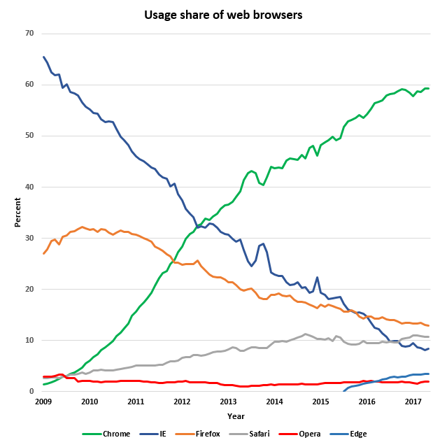 Usage share of web browsers 2009-2017. Source StatCounter